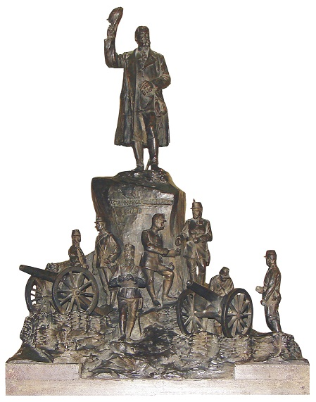 Macheta Monumentului Independentei din Craiova - realizata de Dumitru Pavelescu-Dimo. Monument demolat in anul 1948.